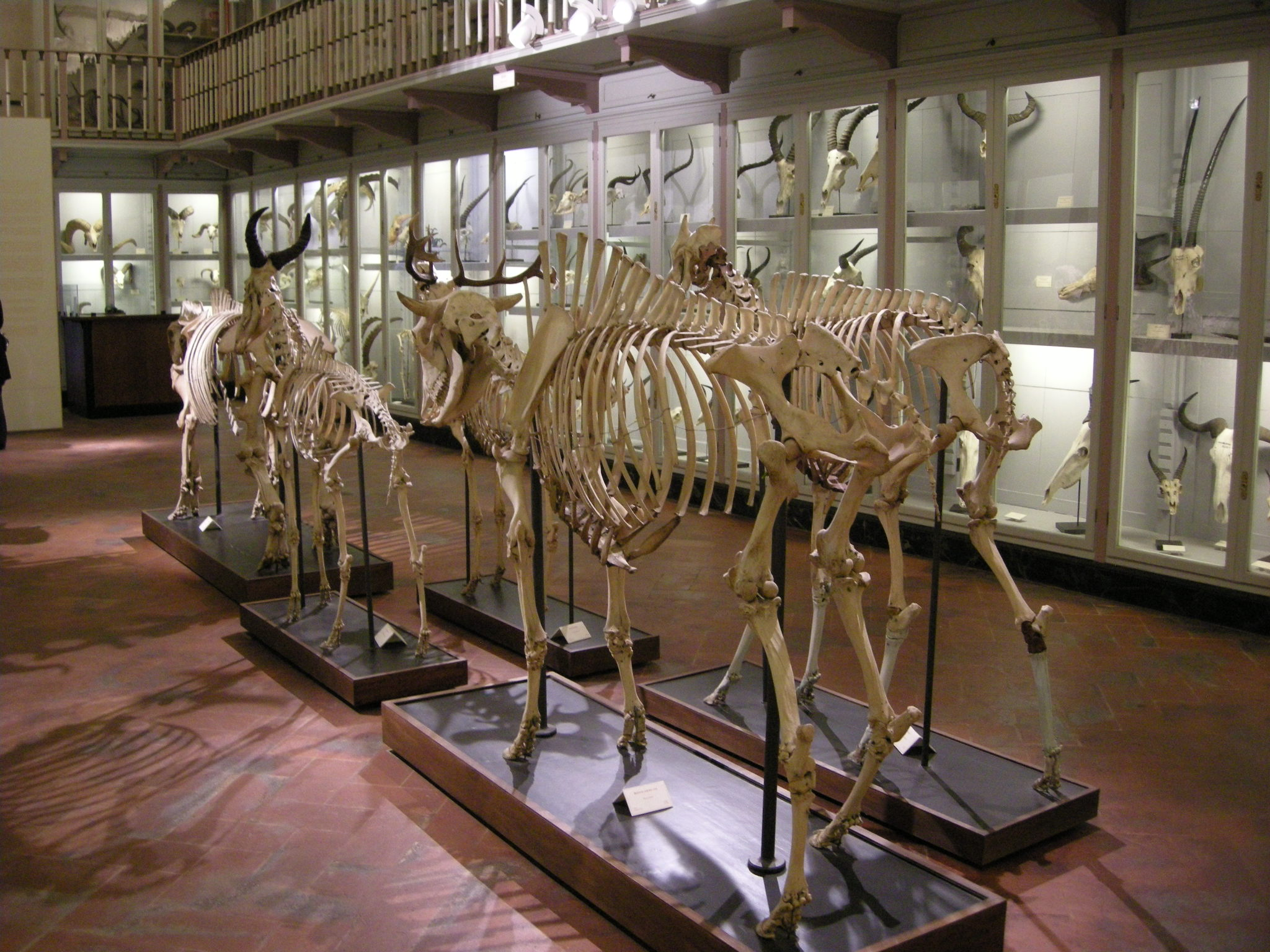 Specola, sala degli scheletri